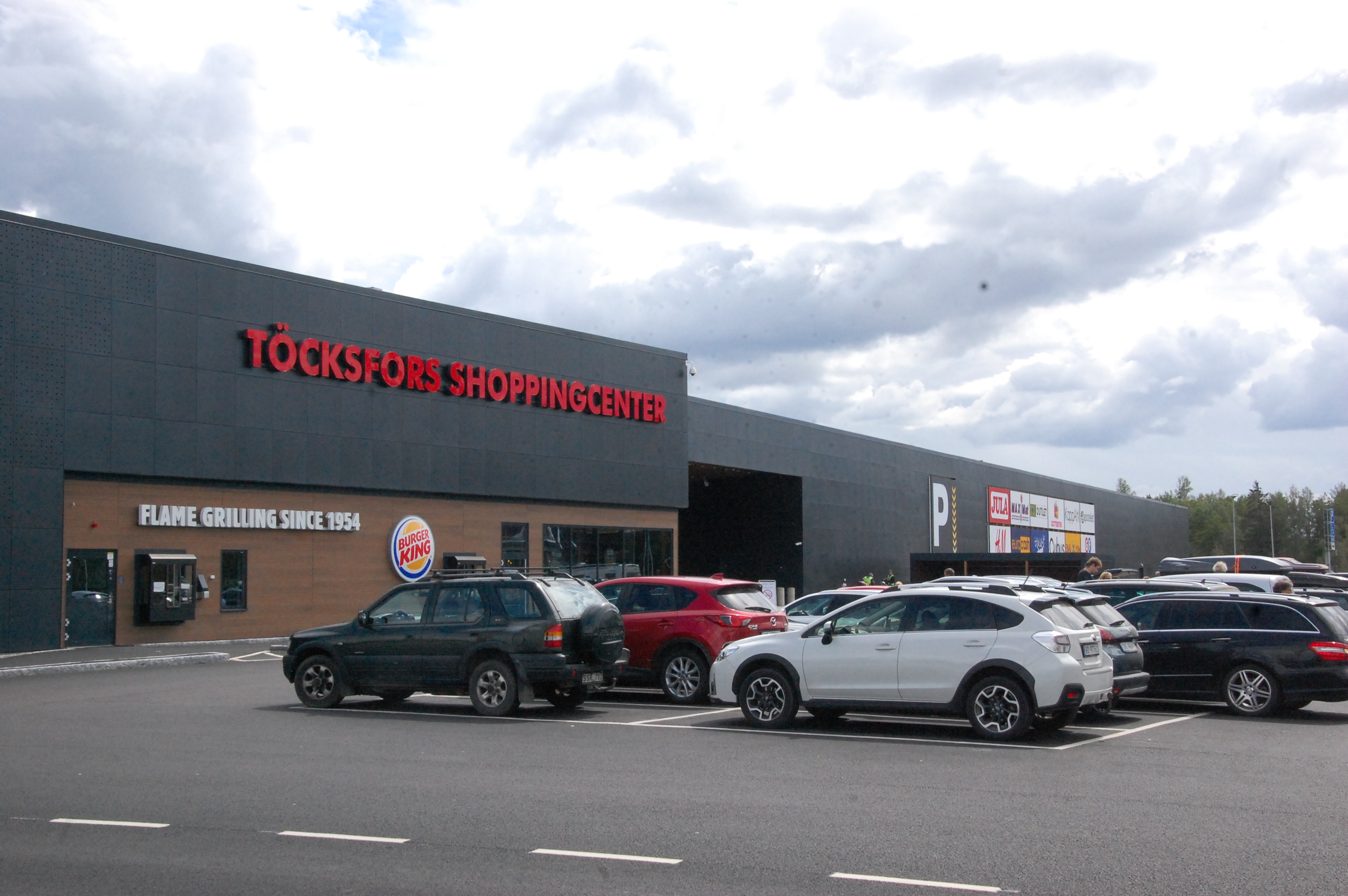 Töcksfors shoppingcenter i juli 2019 efter utbyggnaden med 9 000 kvadratmeter